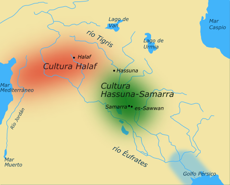 Mesopotamia en el período 6 según la escuela de Lyon[1]